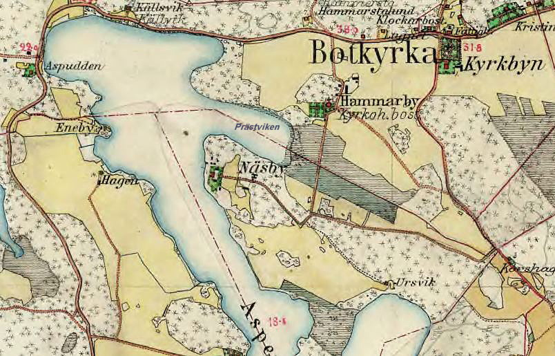 Näsby gård på Häradsekonomiska kartan